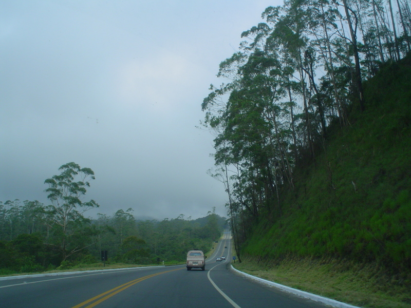 Techo de planalto da Rodovia Mogi-Bertioga (SP-98).